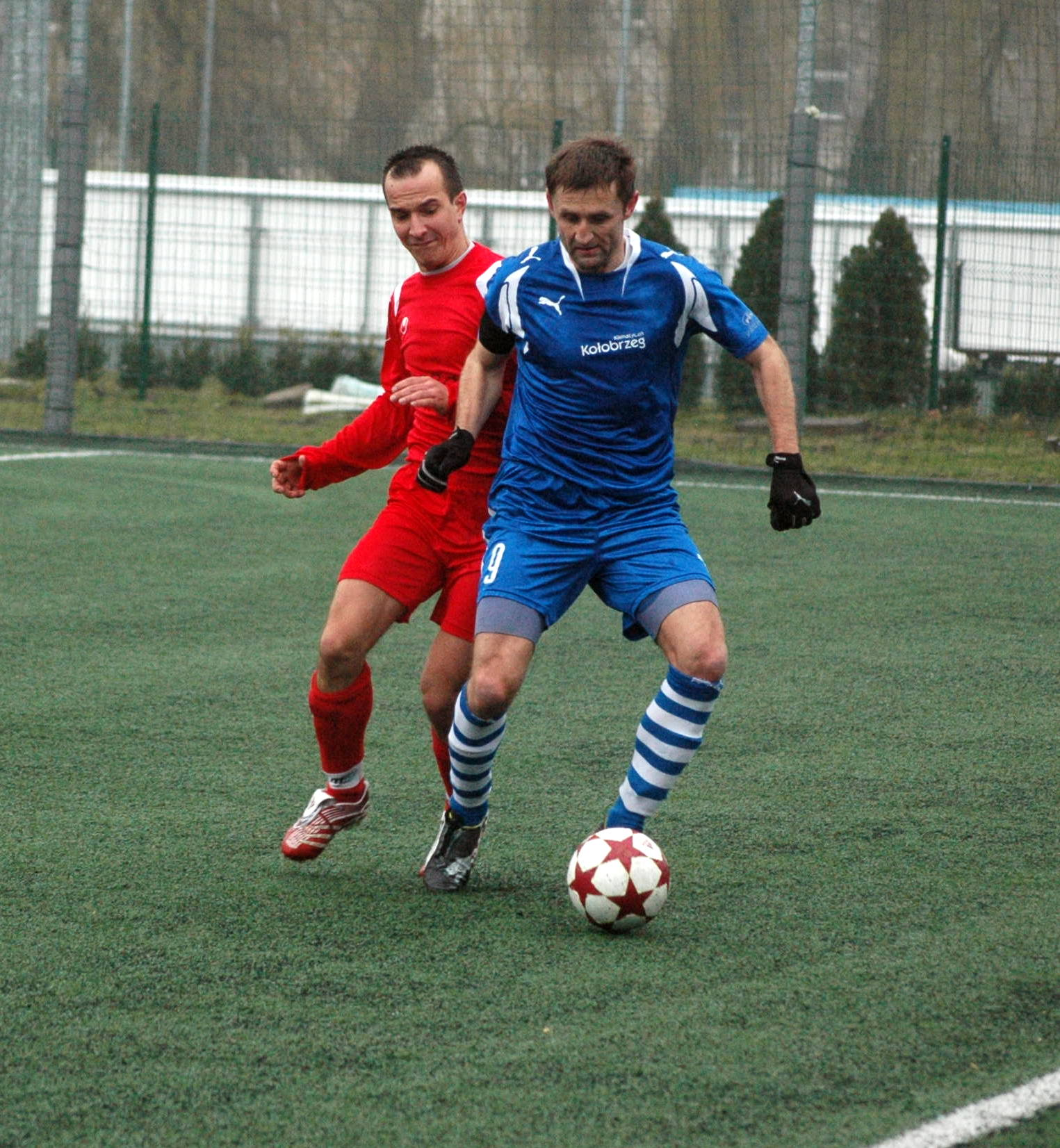 Mecz pomiędzy Kotwicą Kołobrzeg i Dębem Dębno. III liga Bałtycka (2009/2010)